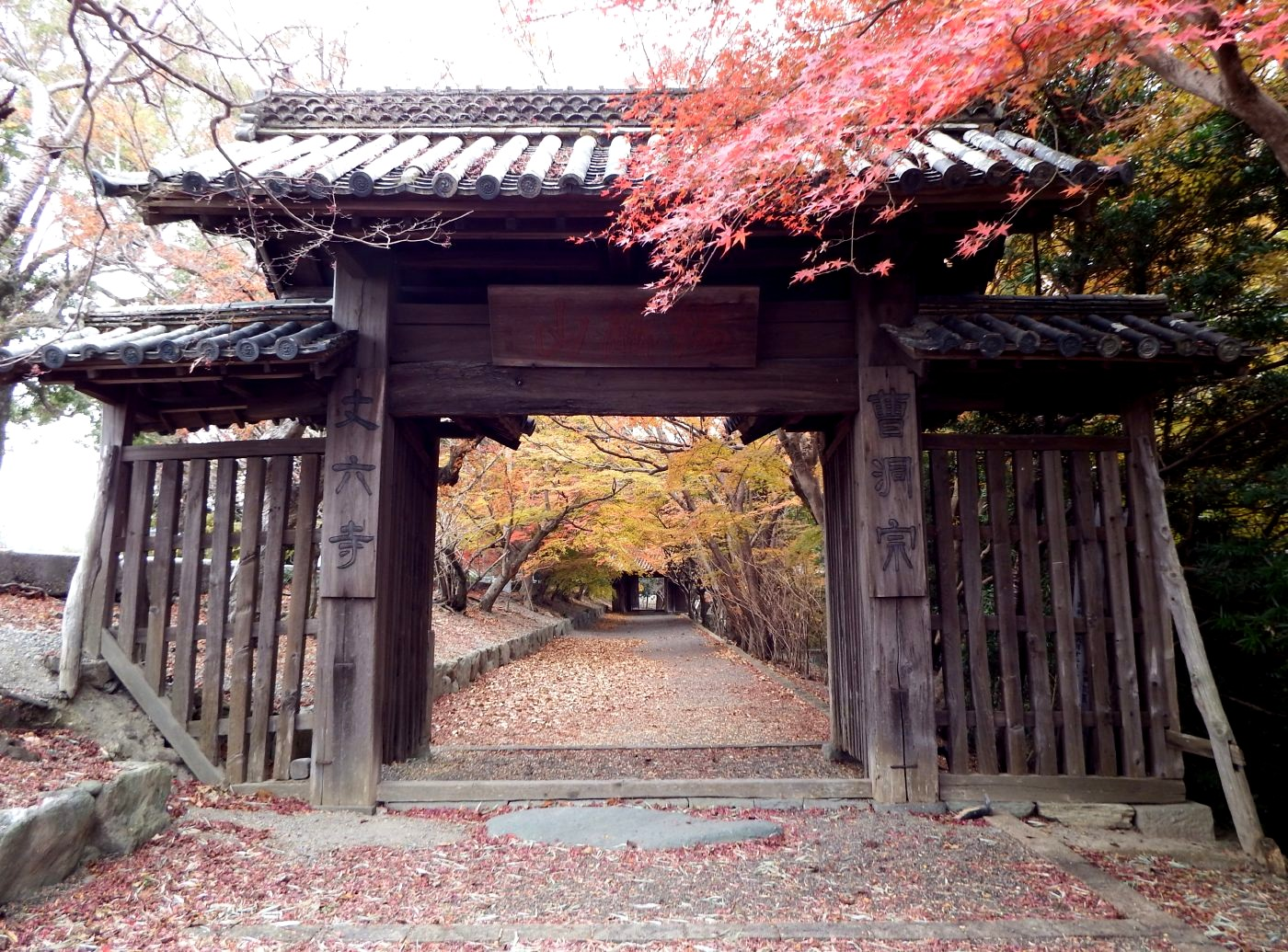 丈六寺の総門